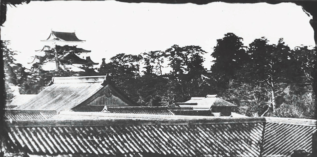 名古屋城二之丸御殿･天守写真 (ガラス原板) 徳川慶勝撮影 (なごやじょうにのまるごてん・てんしゅしゃしん（がらすげんばん) とくがわよしかつさつえい) 名古屋城二之丸御殿･天守写真 (ガラス原板) 徳川慶勝撮影 二之丸東鉄門北側の多聞櫓上より西方面を撮影した写真の原板です。手前の二之丸御殿の屋根越しに天守が写されています。左側の大屋根が奥の対面所である御広間、右側に当主の私的空間である桜之間・梅之間の屋根が見えます。天守と二之丸御殿が同時に写された唯一の写真です。 江戸時代 19世紀 徳川林政史研究所蔵 展示期間:11月27日から12月16日